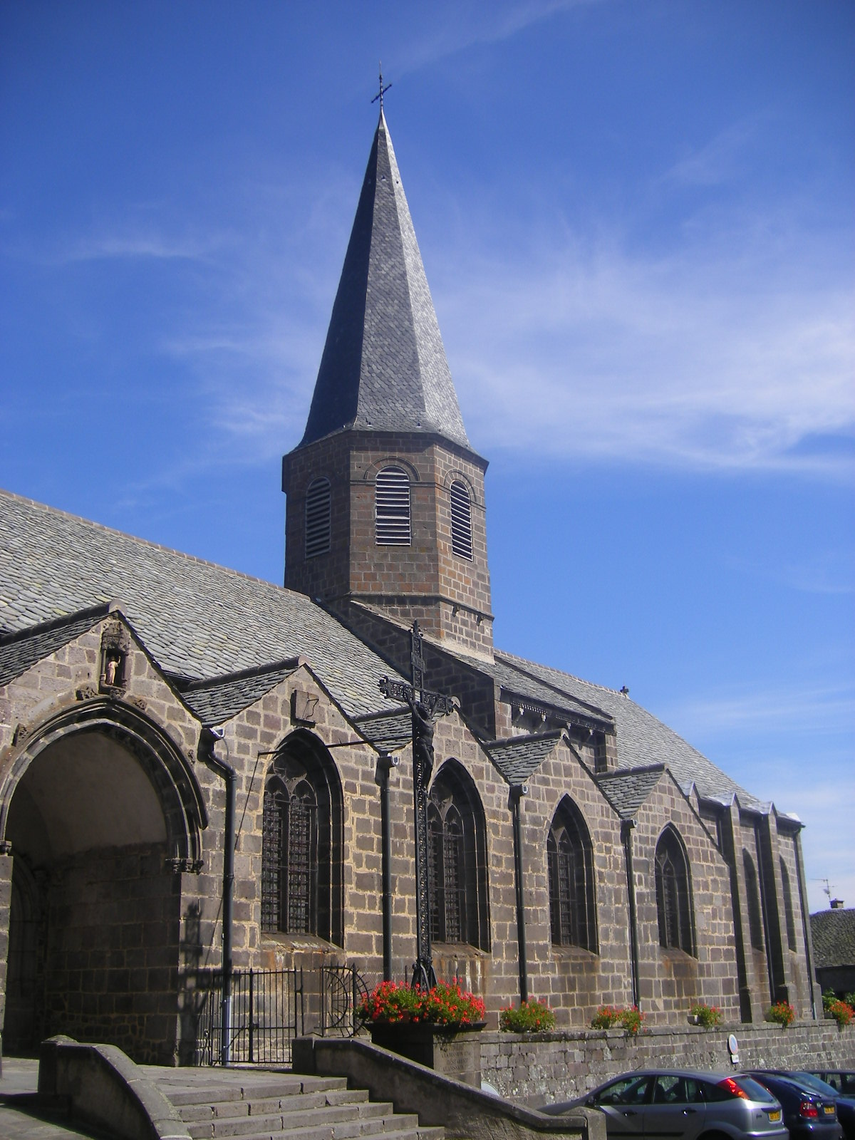 Besse-et-Saint-Anastaise - St. André Church